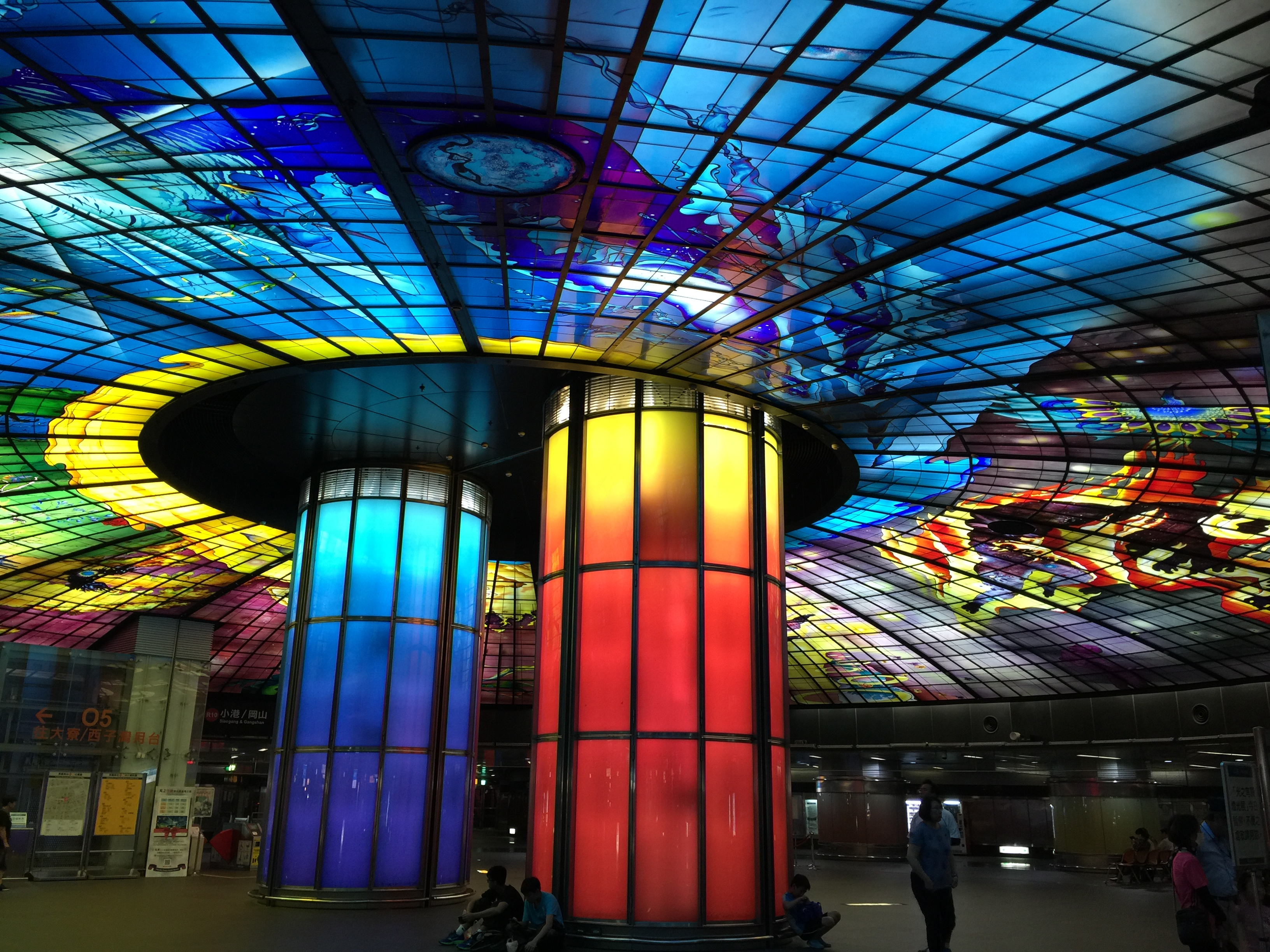 Lichtdom in Kaohsiung Taiwan